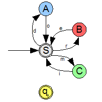 Automate à états fini obtenu sans application d'algorithme de minimisation